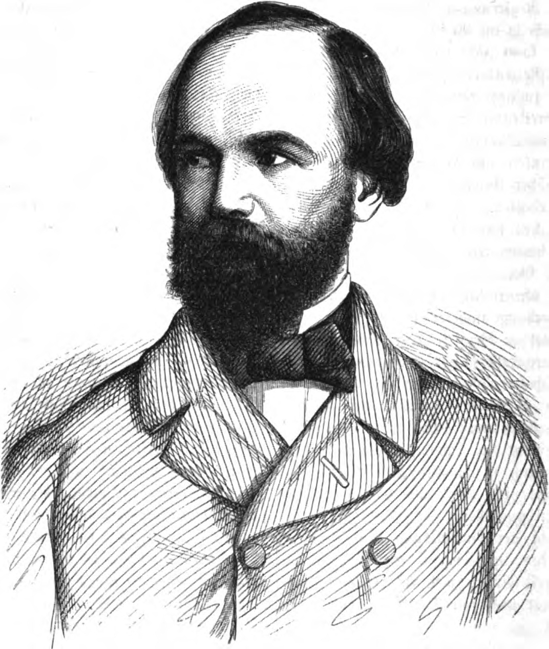 Charles Auguste Fraikin, belgischer Bildhauer im 19. Jh.